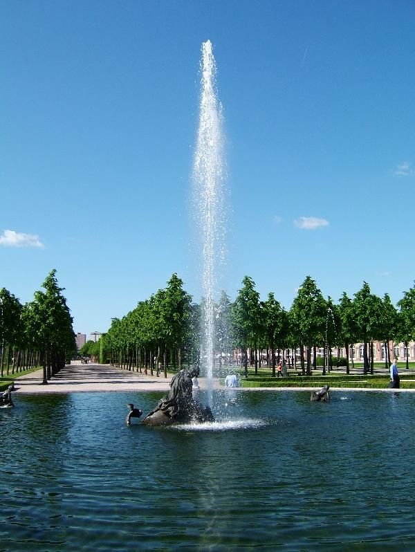 Schloß Schwetzingen